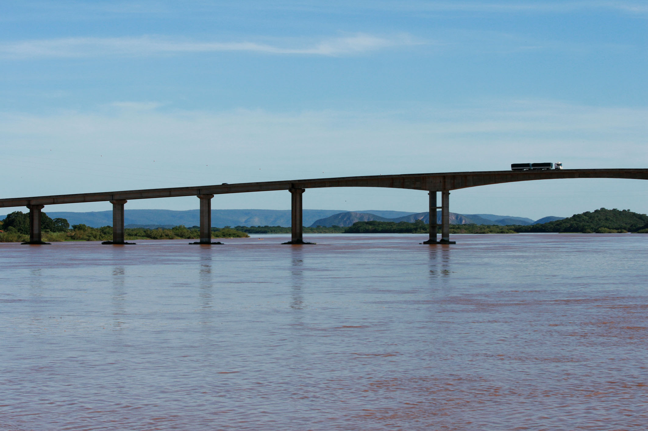 Plenária do Plano Plurianual Participativo em Ibotirama Na foto: Rio São Francisco Autora: Carol Garcia / AGECOM